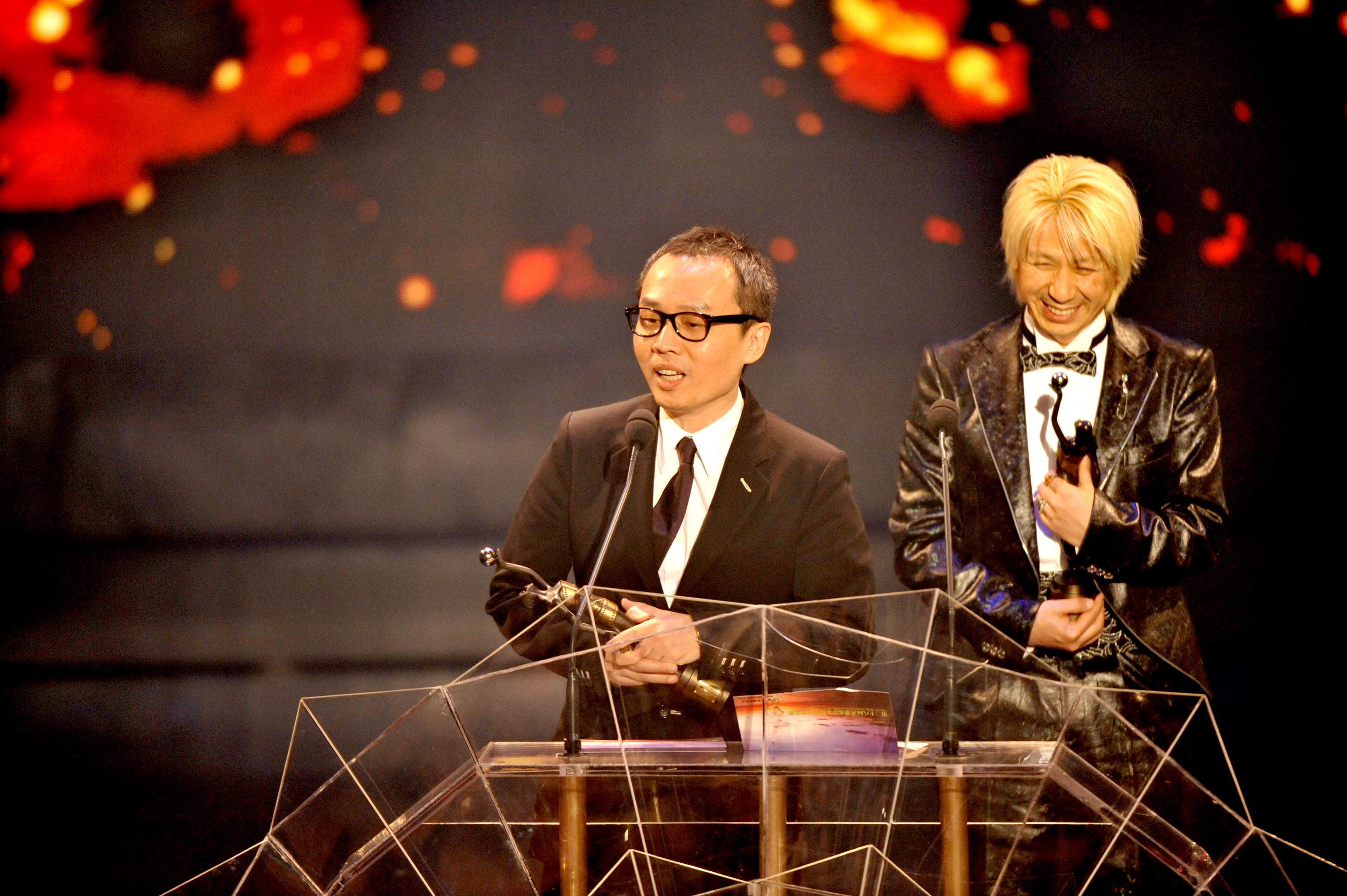 第二十八屆香港電影金像獎最佳原創電影歌曲獎 陳少琪